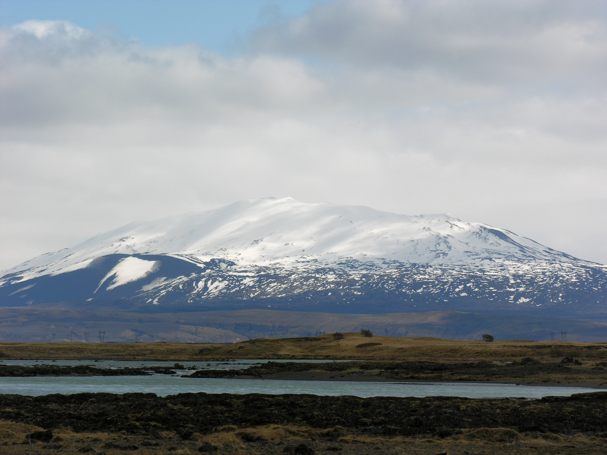 Iceland, Þjórsá and Hekla